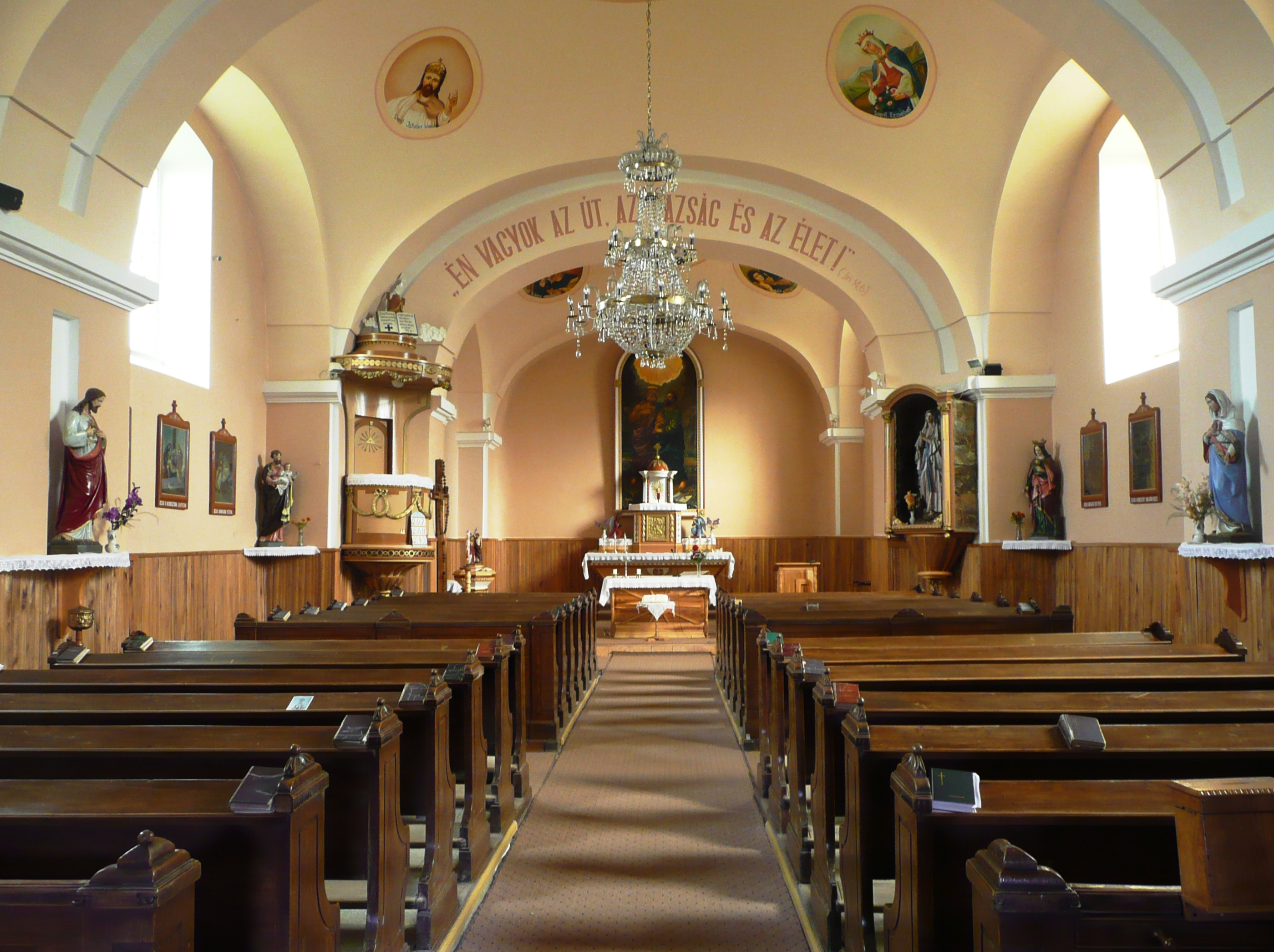 A kőrösmezői római katolikus templom belseje, Kárpátalja